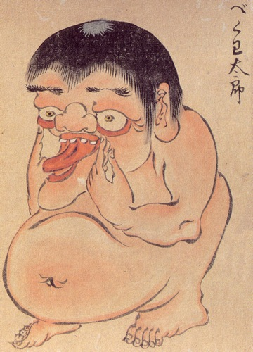 Bekuwa-Tarō (べくわ太郎) from the Hyakki Yagyō Emaki (百鬼夜行絵巻)